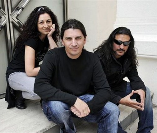 Ángeles, Miguel Ángel y Dioni, los tres protagonistas de Camela